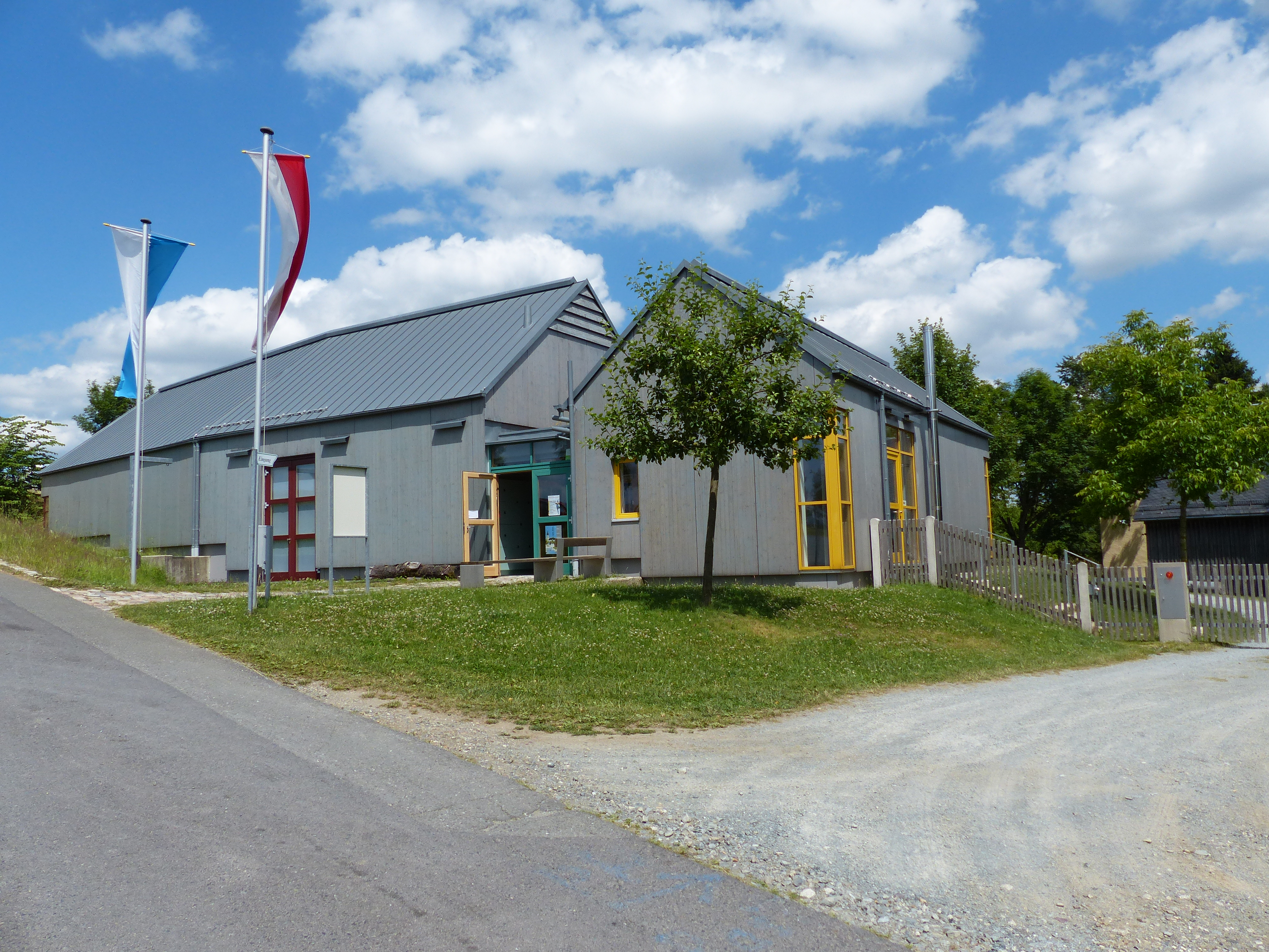 Ansicht von Kleinlosnitz, Ortsteil von Zell im Fichtelgebirge